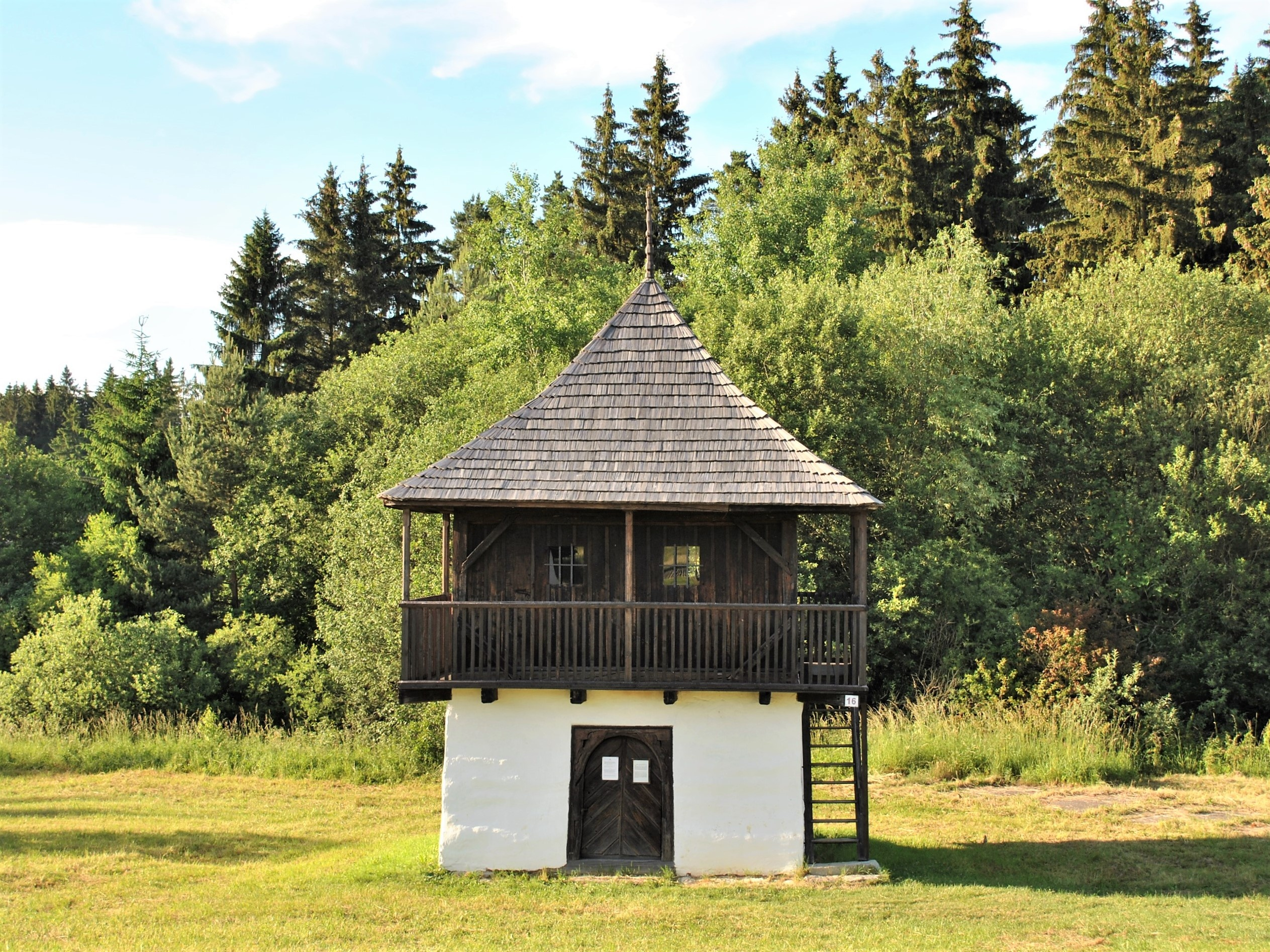 Martin, Slovensko - Múzeum slovenskej dediny - záhradný domček zo Slovenského Pravna z roku 1731; obsahuje zaujímavú iluzívnu výmaľbu z roku 1792 od maliara Liboria Lazara